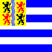 Vlag van de voormalige Zeeuwse gemeente Poortvliet